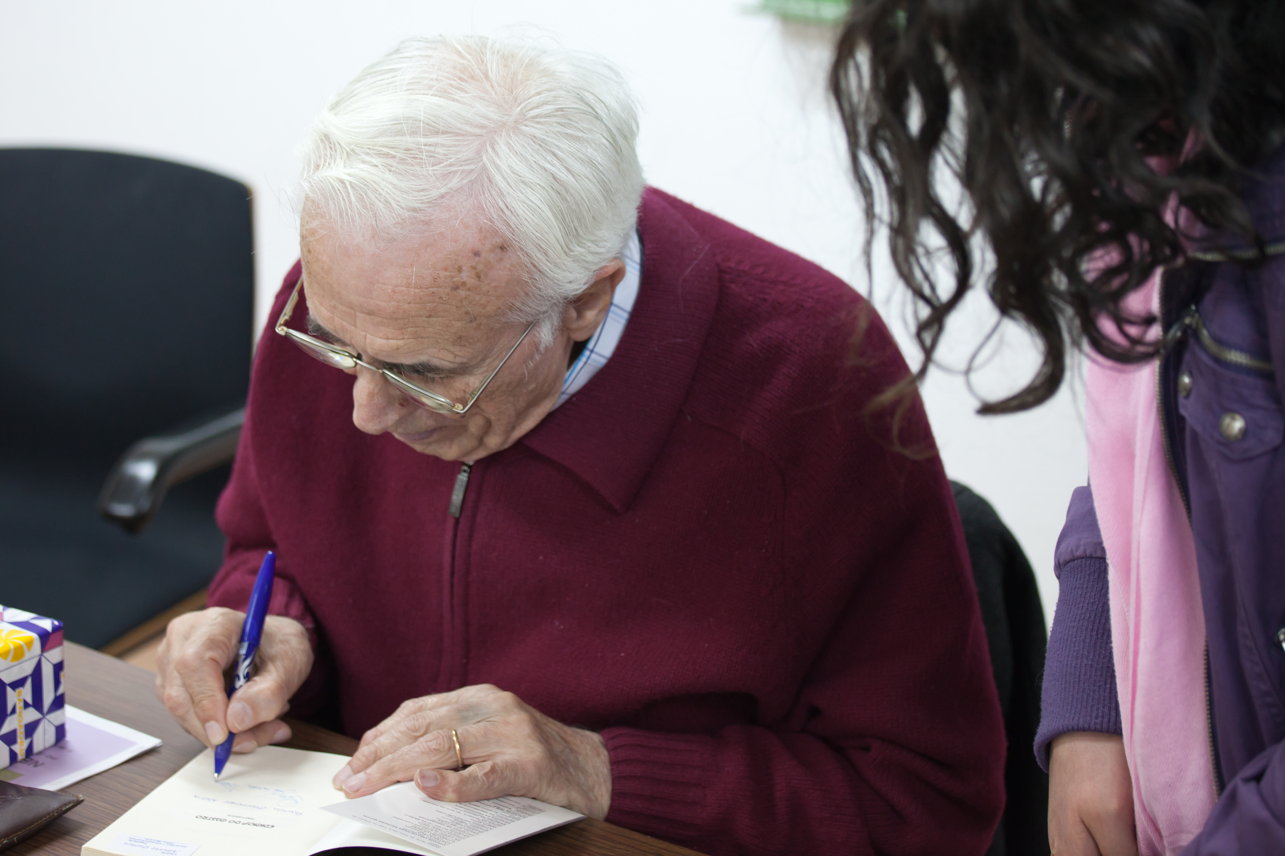 05-05-2010. Neira Vilas no IES Manuel García Barros da Estrada